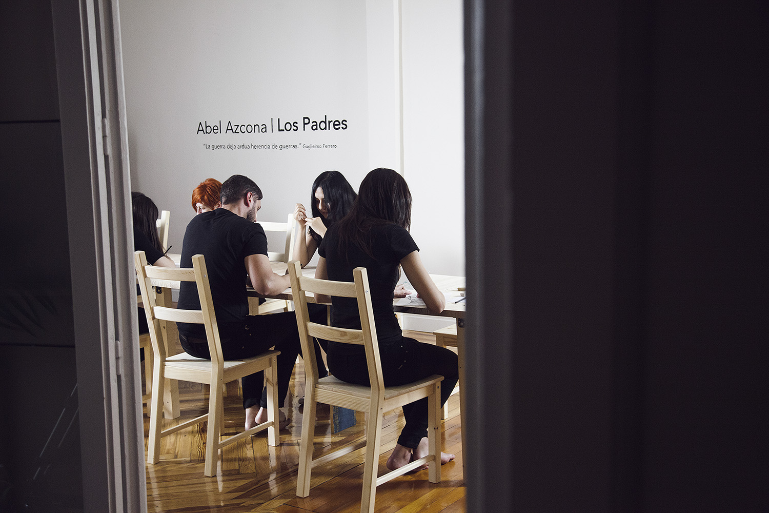 Inauguración de la exposición "Los Padres" del artista Abel Azcona en Madrid - 2